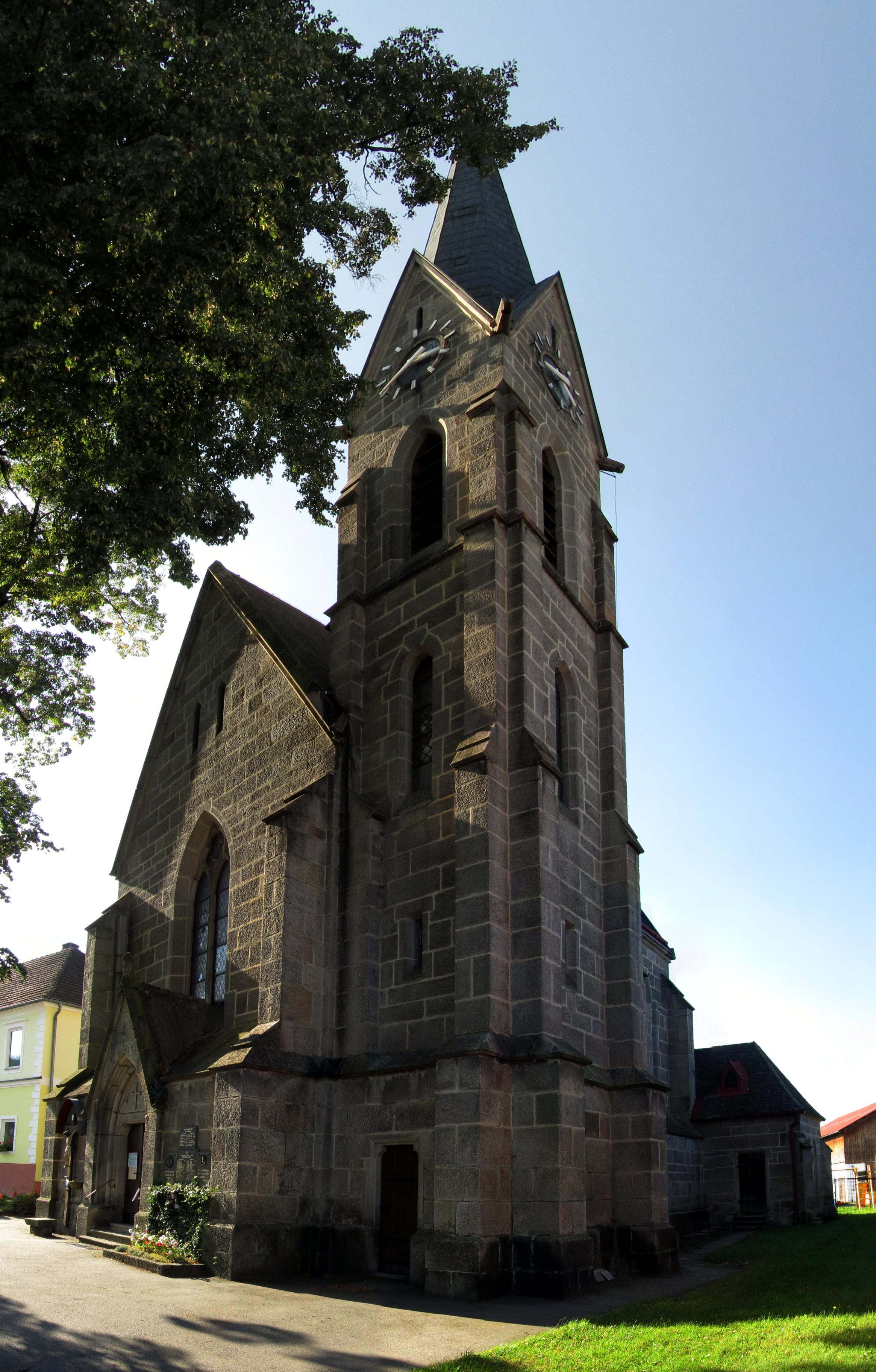 Kath. Pfarrkirche Mariä Himmelfahrt